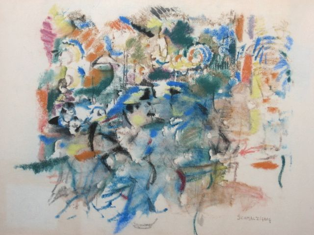 Pastel 30,5 x 50 cm Title: Terras